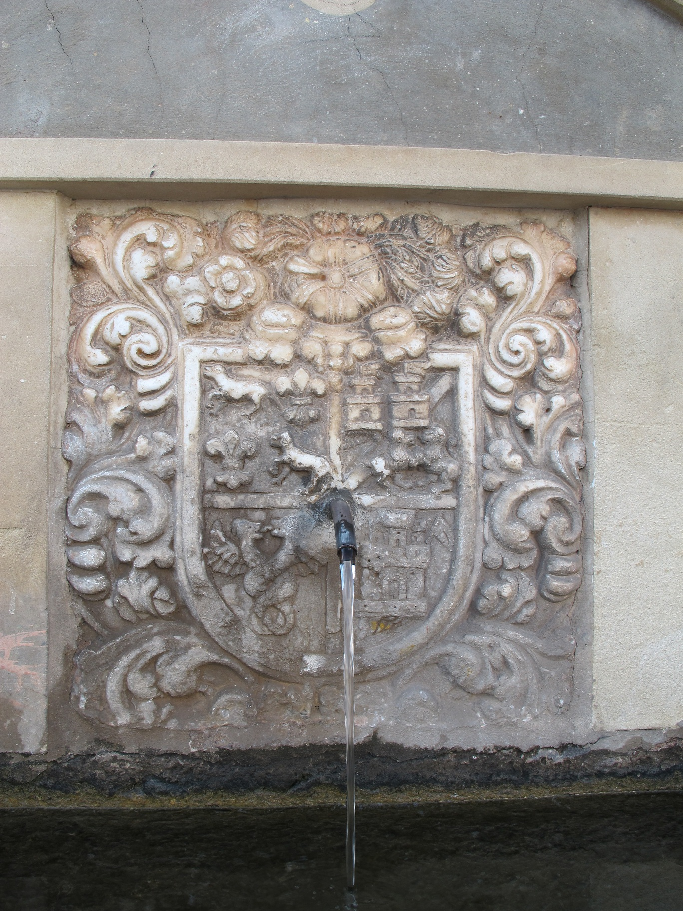 Escudo de los Marqueses de Iniza en el Pilar de la Cañada, Laujar de Andarax (Almería)